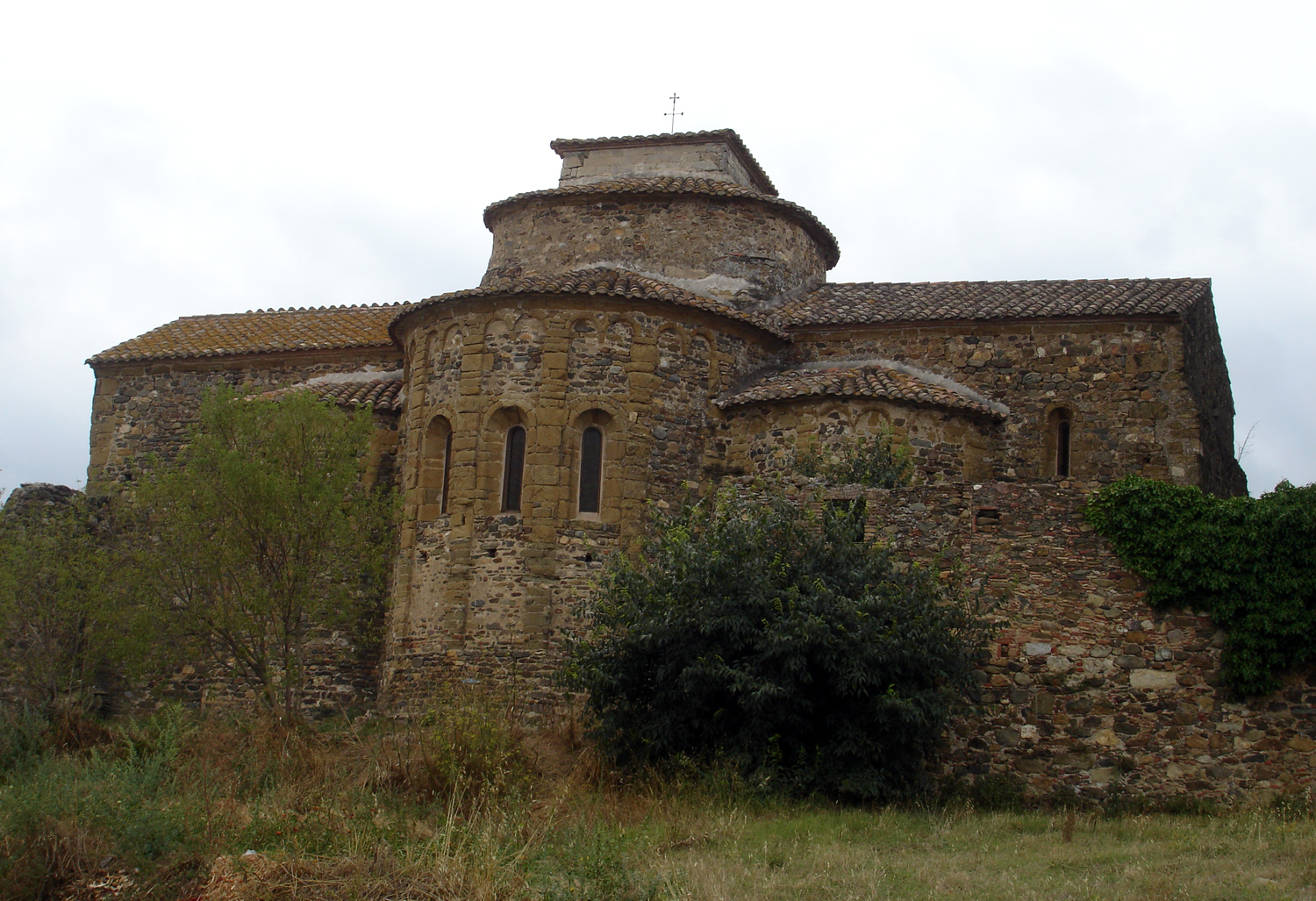 Monestir de Sant Miquel de Cruïlles (Girona, Catalunya, Espanya)